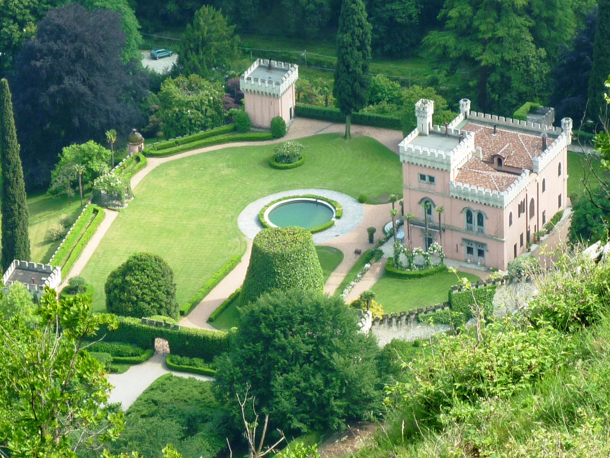 Castello di Griante, Griante, Comersee, Italien